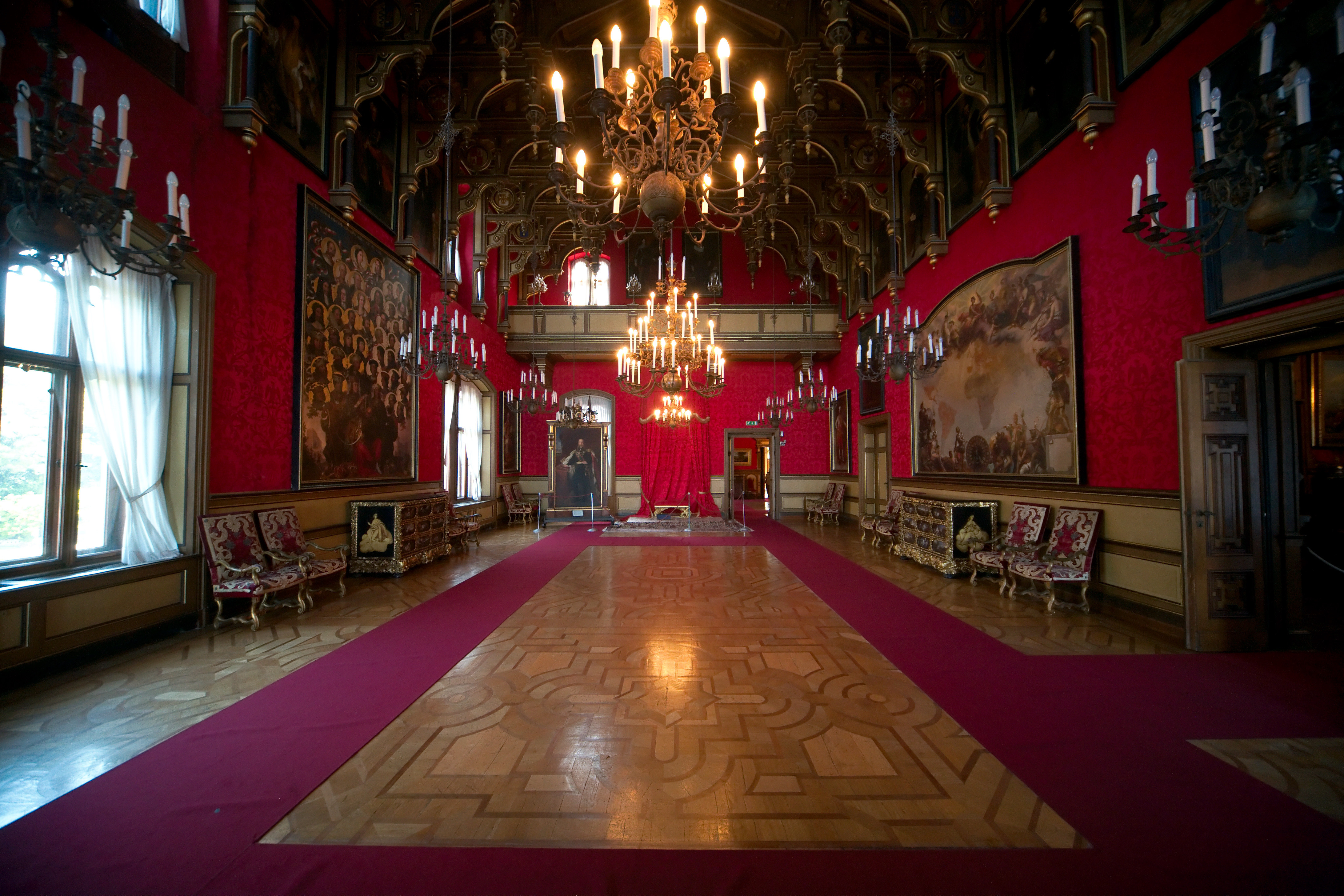 Castello Miramare interior